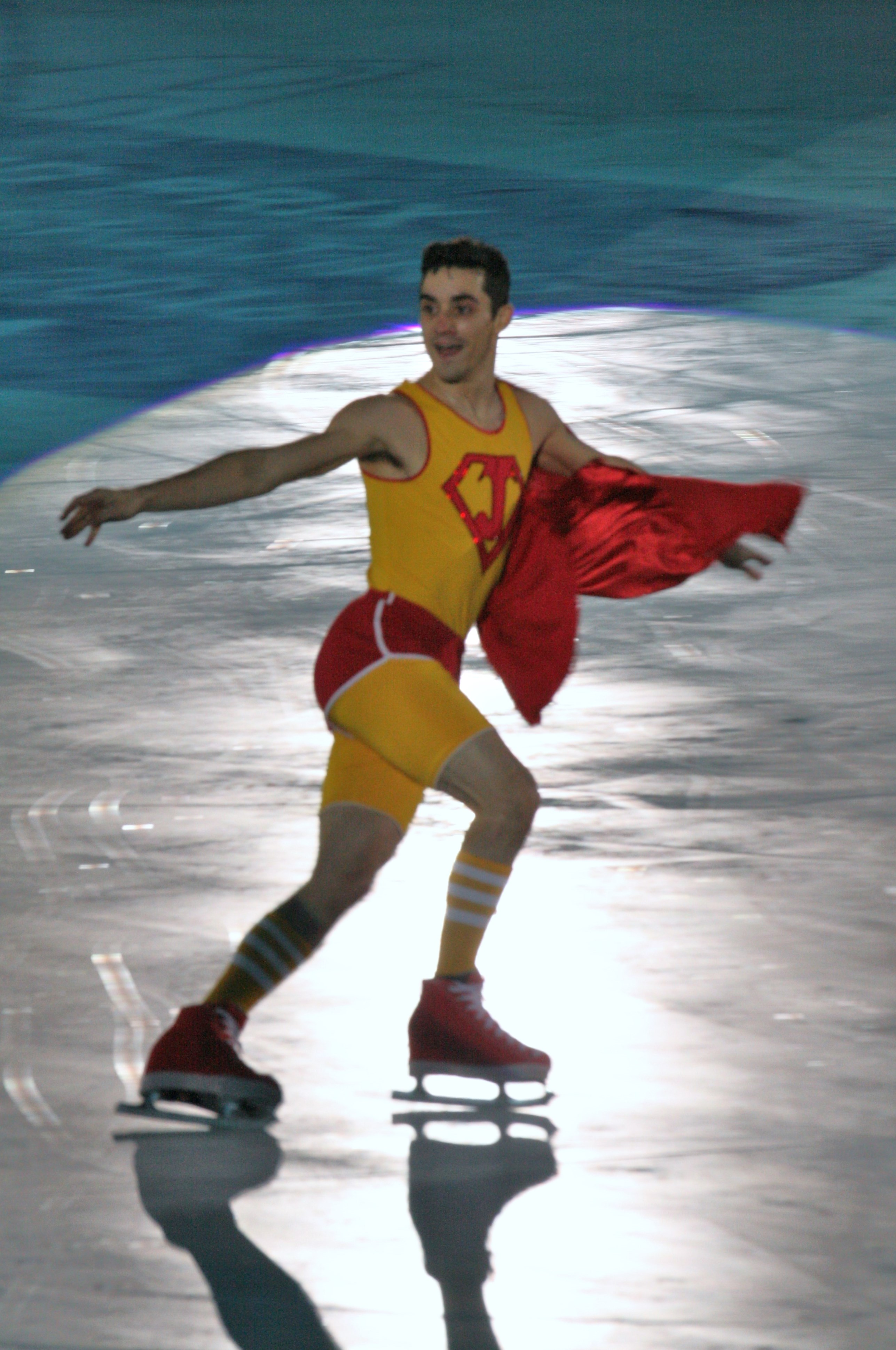 Хавьер Фернандес (Испания) на показательных выступлениях в финале Гран-при по фигурному катанию 2015-2016.